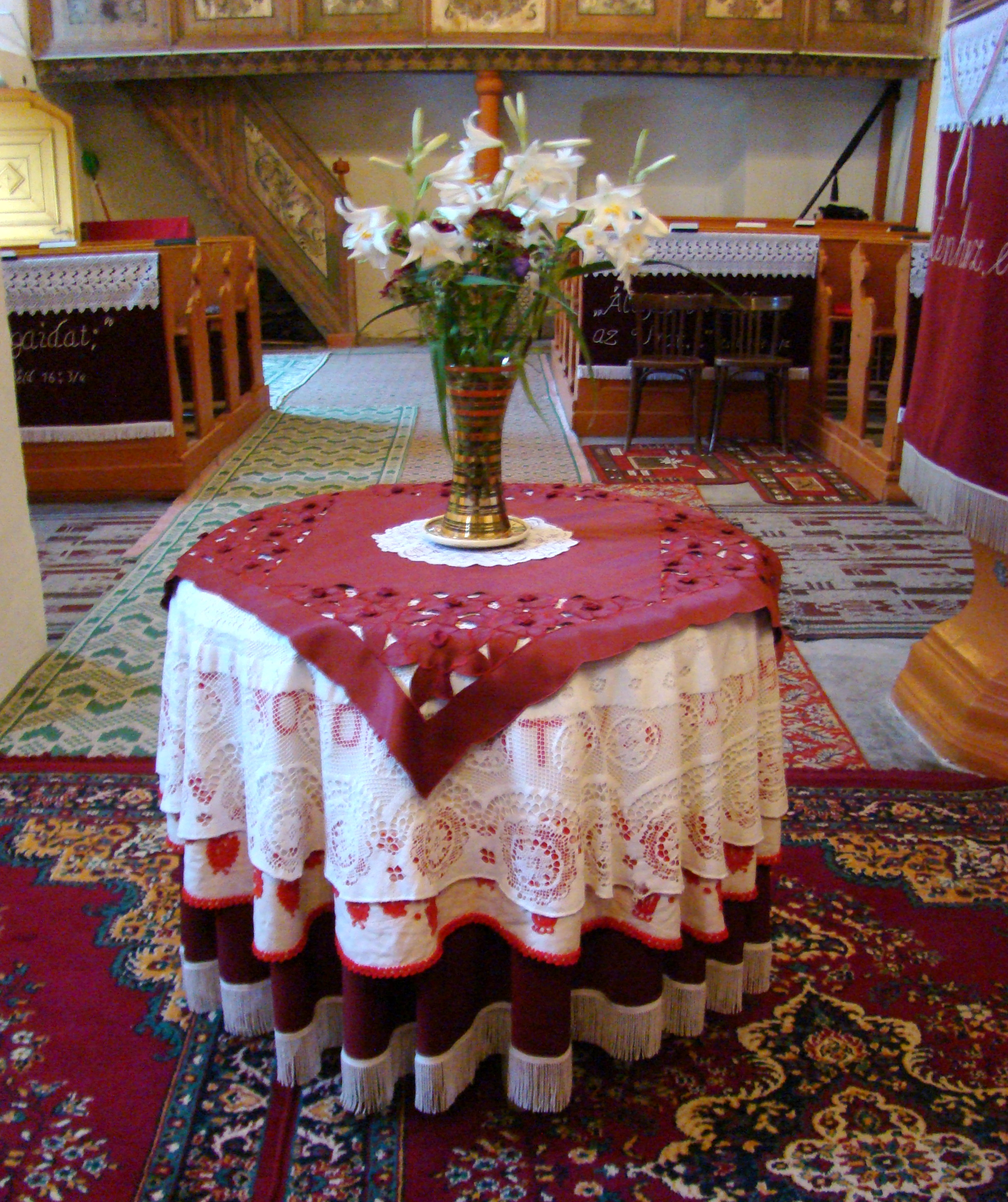 Biserica reformată, sat aparținător Sâncrai; municipiul Aiud, județul Alba 01